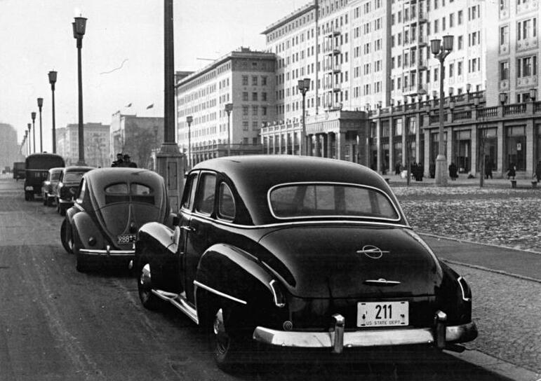 Zentralbild Weiß 4.2.1954 Während der Viererkonferenz in der Stalinallee Die in- und ausländischen Gäste interessieren sich besonders für die schönste Strasse Deutschlands, die Stalinallee in Berlin. UBz: Ein Westberliner Wagen und ein Wagen der US-Armee parken vor dem Block C-Nord.